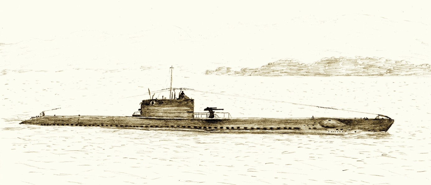 Субмарина "Сирен", ВМС Франции, Вторая мировая война